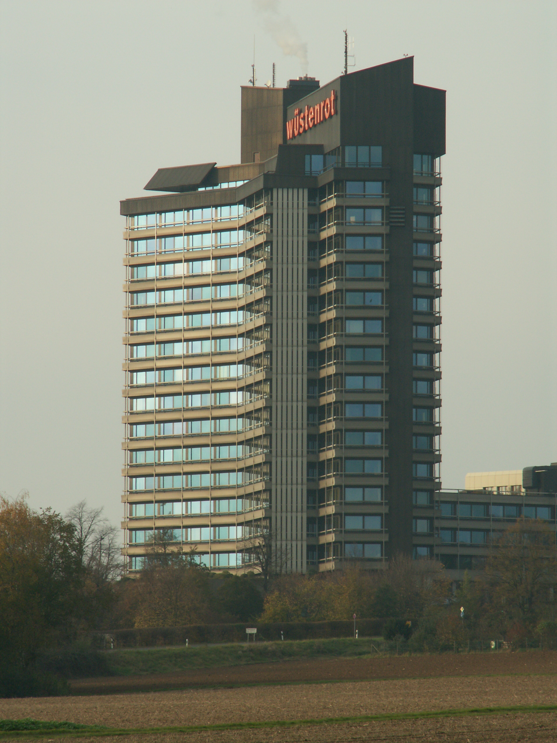 Wuestenrot Building in Ludwigsburg